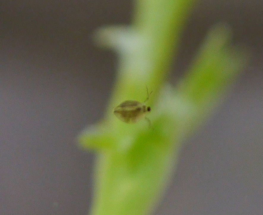 Scapholeberis sp.：アオムキミジンコ属の1種 Col. 2017/05/26 和歌山県田辺市：Tanabe City. Wakayama Pref. Japan